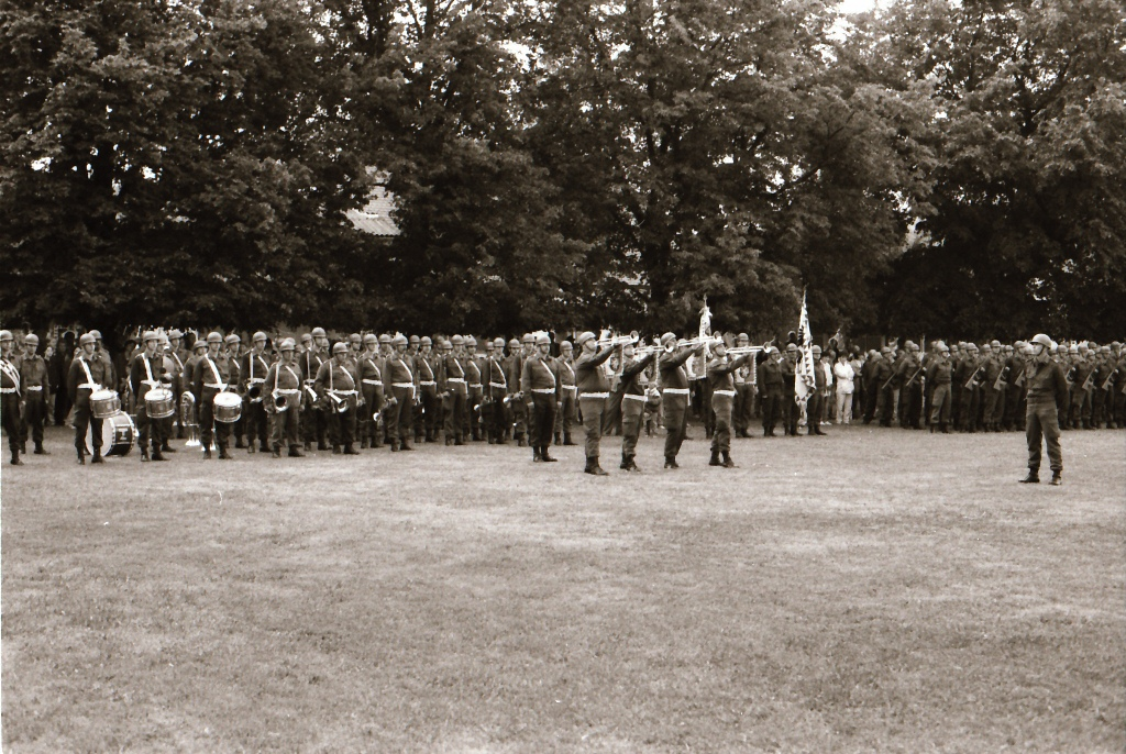 Angelobung mit großen Zapfenstreich und der Militärmusik Steiermark.